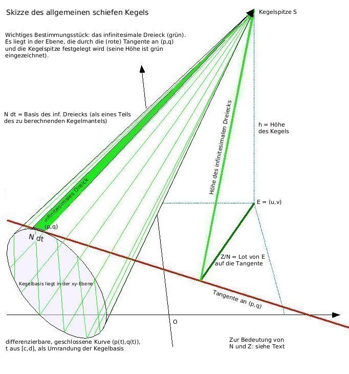 Skizze eines Schiefkegels mit Bestimmungsstücken